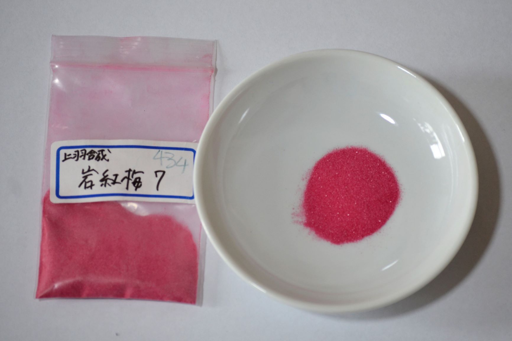 岩絵具の一種である合成岩絵具。